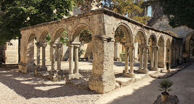 Le Cloître des Cordeliers, à Saint-Emilion (France), classé UNESCO